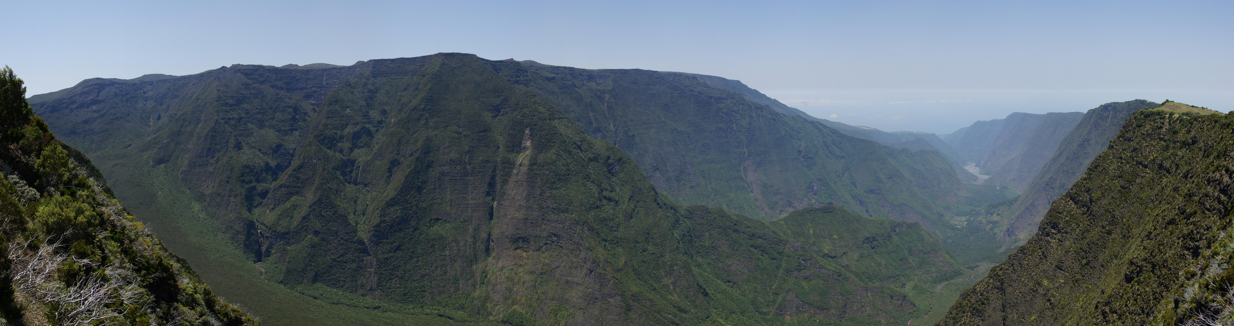 Panorama de la Rivière des remparts - vue du RF5 - 2